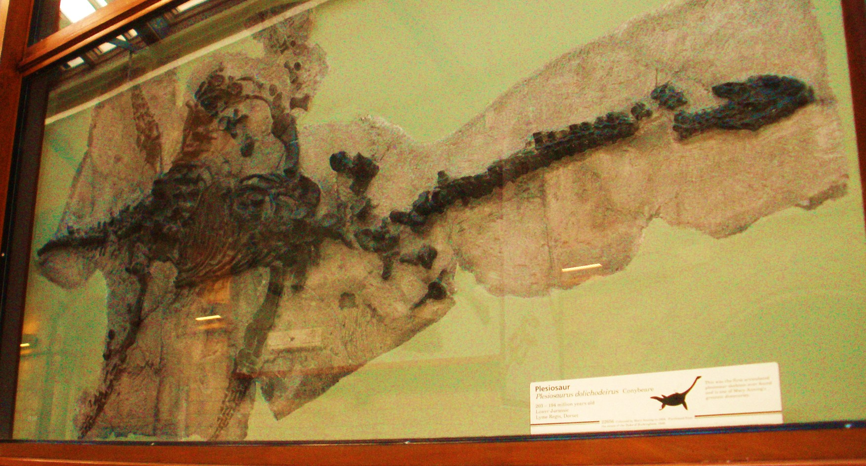 Fossil of Plesiosaurus, an extinct reptile-- Took the photo at Natural History Museum, London